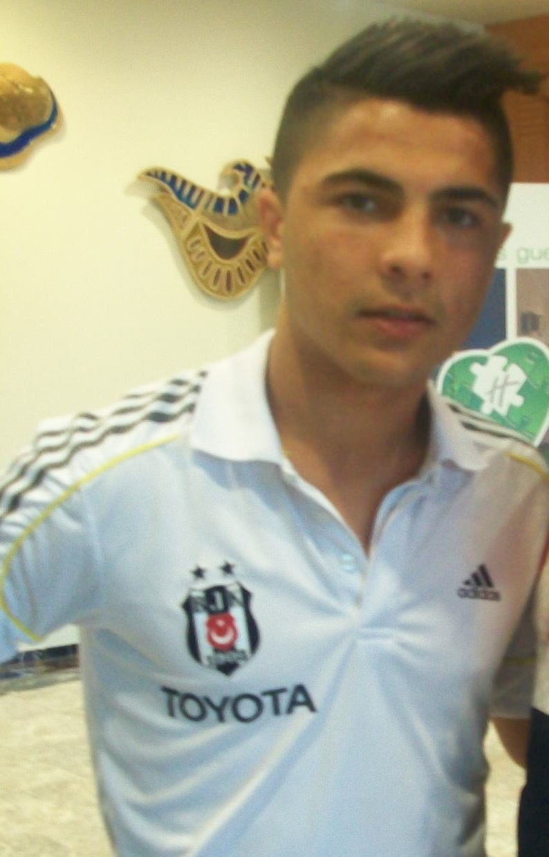 Muhammed Demirci ile taraftarımız fotoğraf çektirdi.